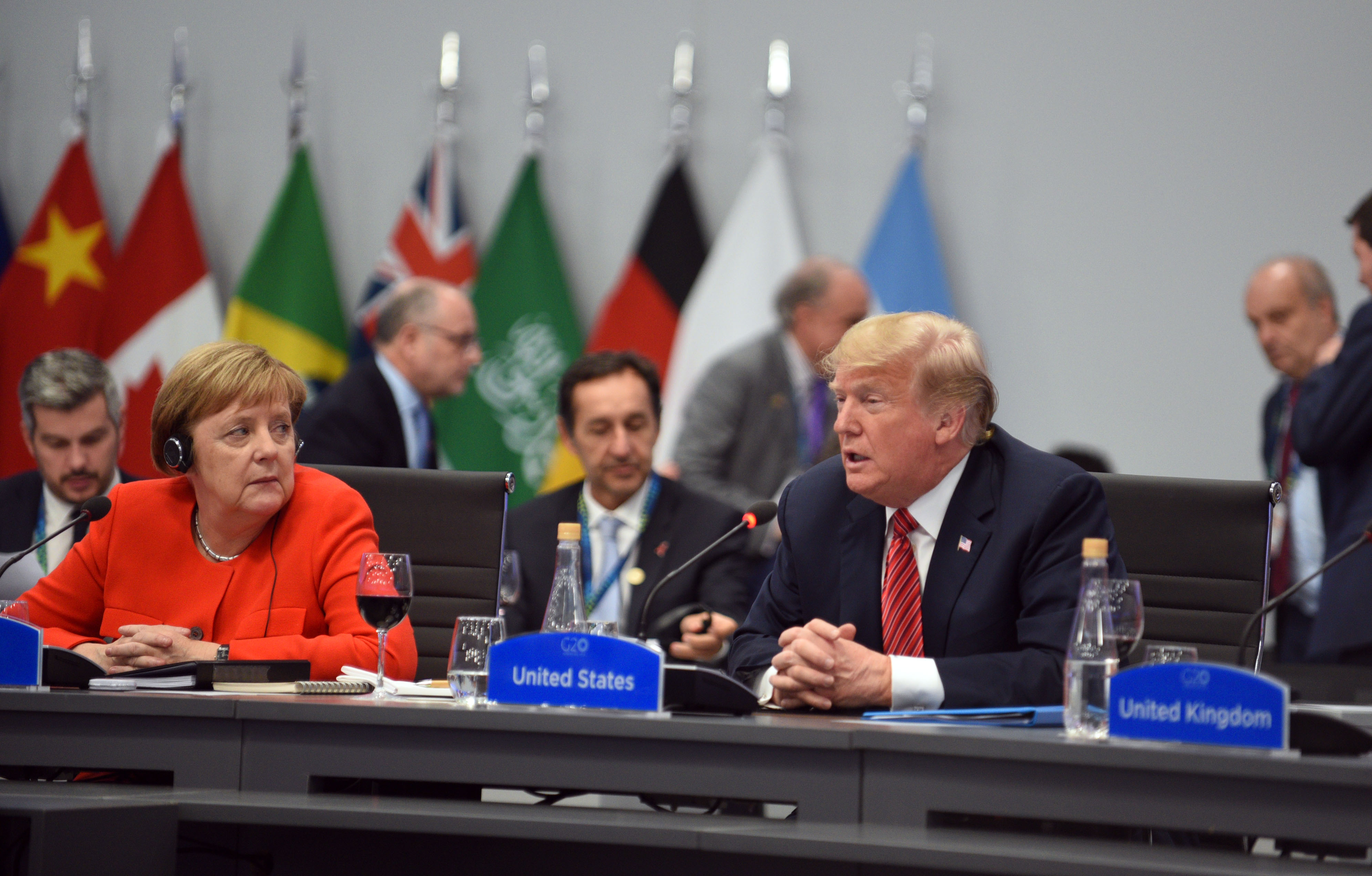 Plenary - Day 2